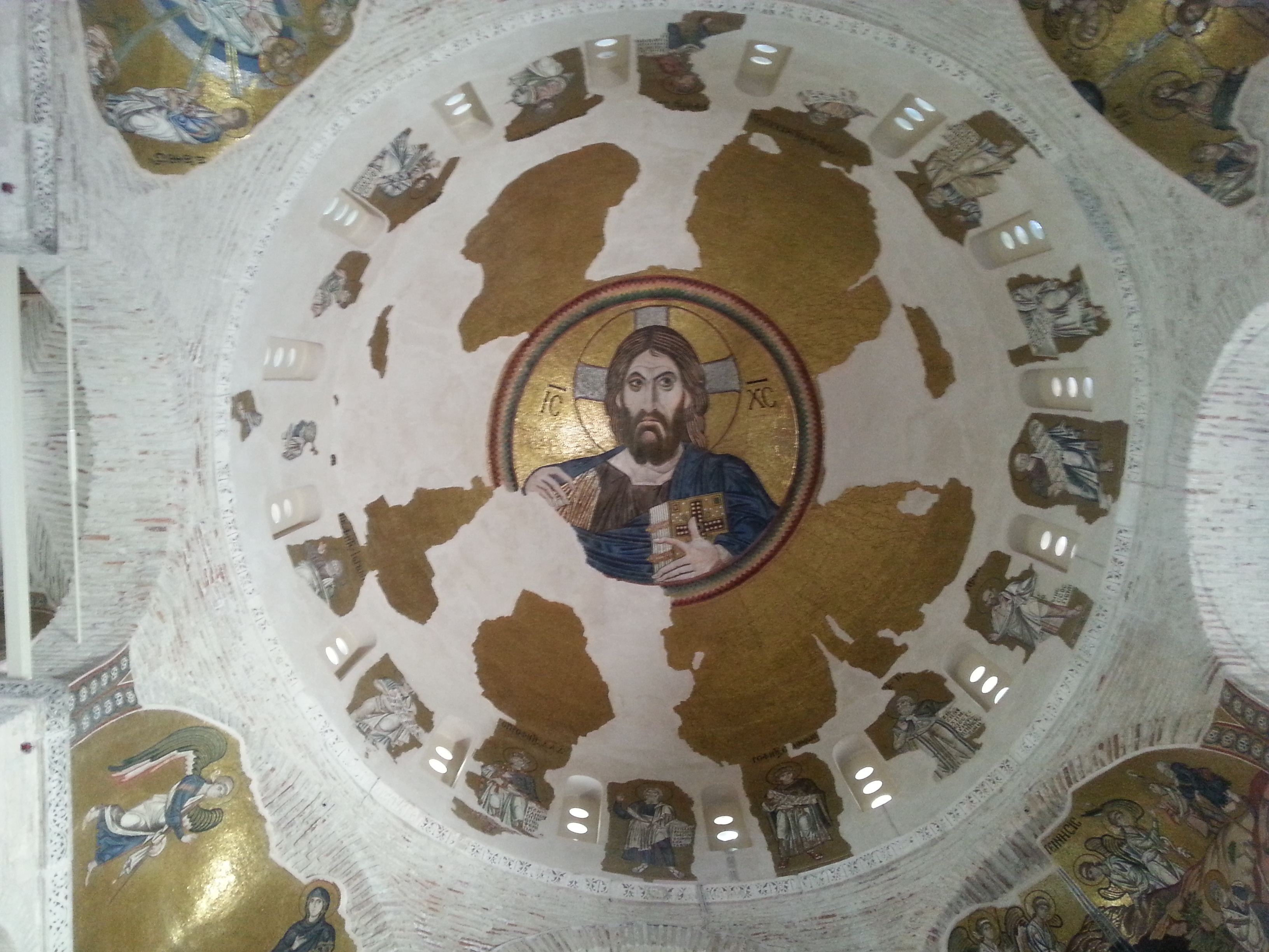 Μονή Δαφνίου«Μονή Δαφνίου»